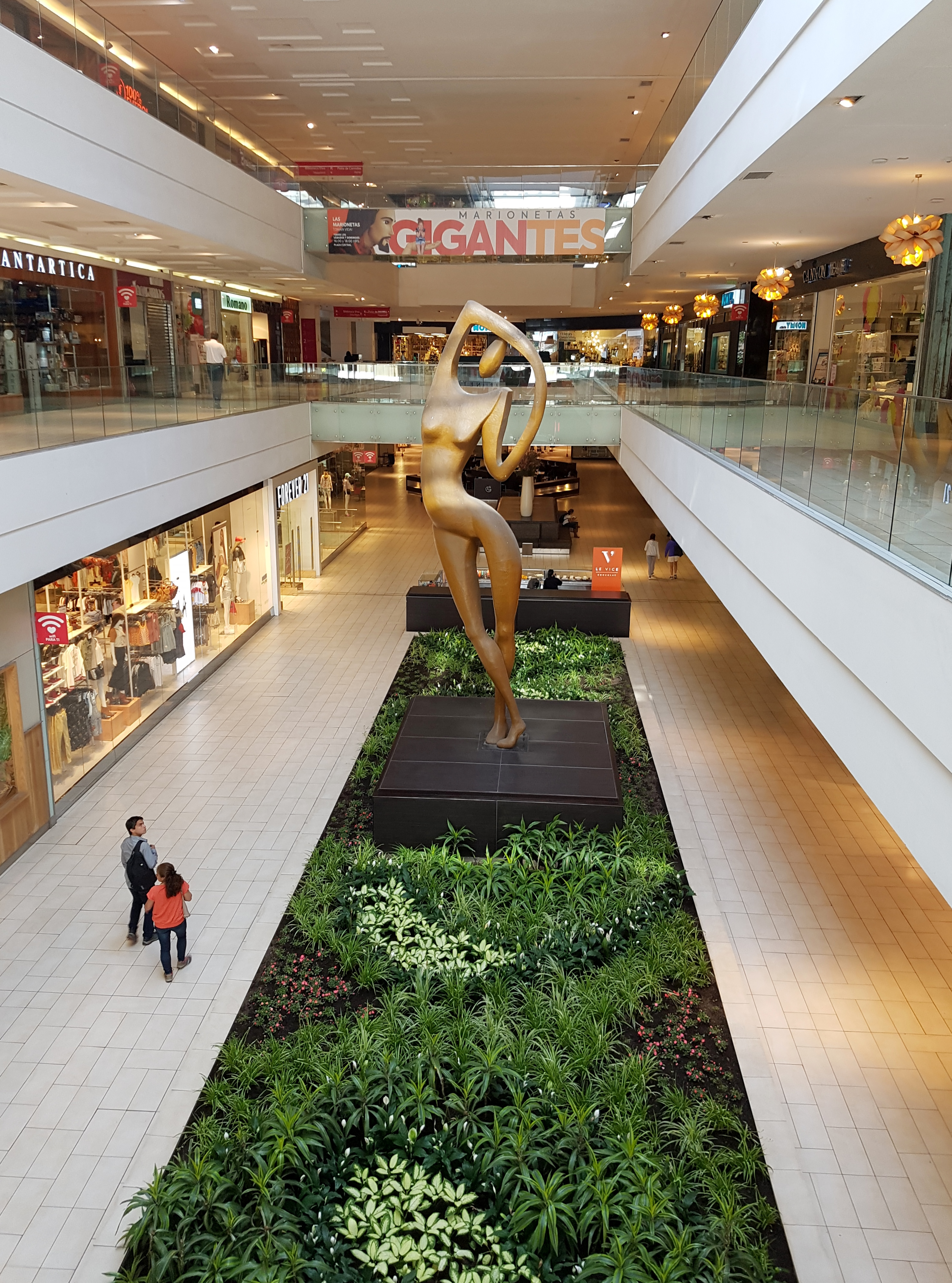 Mall Plaza Egaña, centro comercial ubicado en avenida Larraín n.º 5862, a la salida de la estación de metro Plaza Egaña, comuna de La Reina, Santiago de Chile.